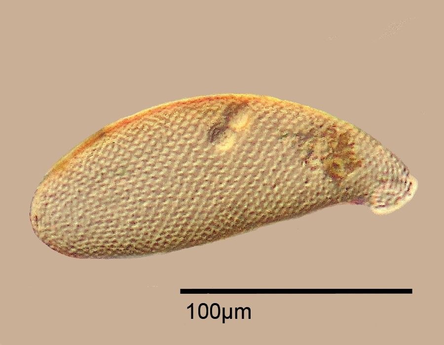 Cyphoderia ampulla - Testate amoeba - 160x